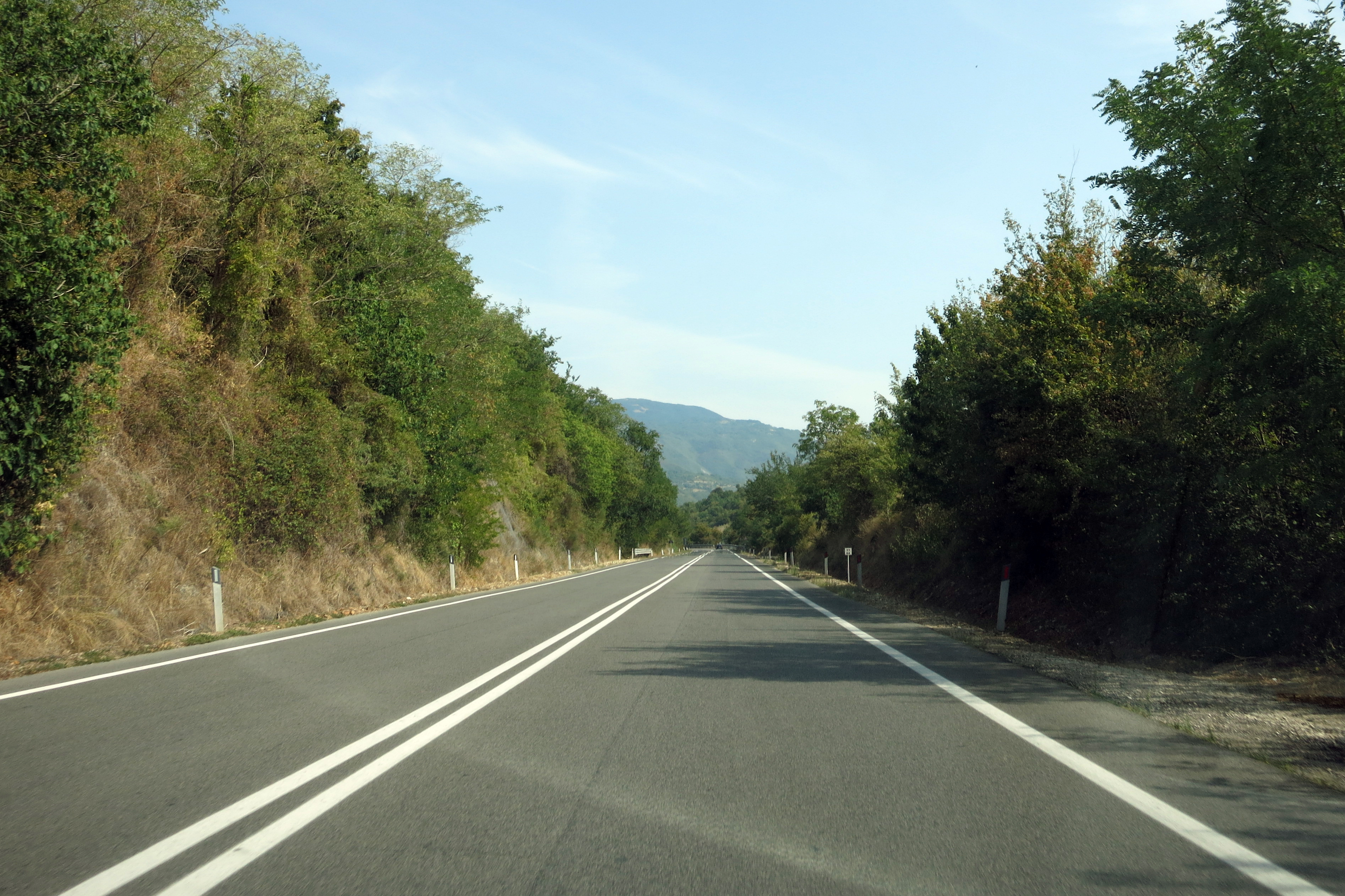 La strada statale 4 Via Salaria nel tratto della "Variante di Cittaducale" (provincia di Rieti, Lazio), aperto al traffico nel 1962 per evitare l'attraversamento del centro abitato